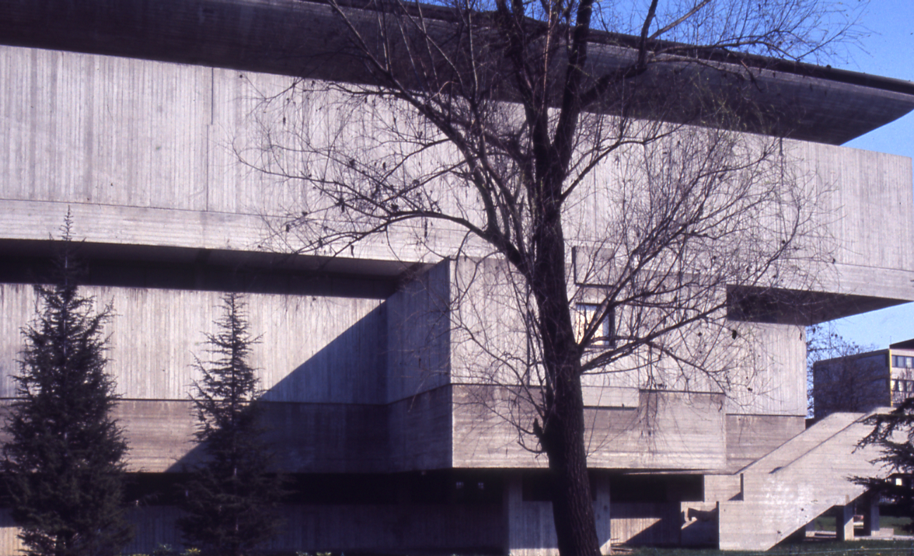 Servizio fotografico : Bologna, 1975 / Paolo Monti. - Foglio: 1, Fotogrammi complessivi: 16/20 : Diapositiva, sviluppo cromogeno/ pellicola ; 35 mm. - ((Sullo chassis della diapositiva n. 17 iscrizione manoscritta "Galleria/ A. Moderna/ Bo". - Confronti con negativi b/n (gelatina bromuro d'argento/ pellicola - 35mm). - Le diapositive nn. 01-04 costituiscono un'altra serie. - (2):. - 05-16 = esterni;. - 18-20 = interni. - Lavori di edificazione dal 1970 al 1975 ca., anno dell'inaugurazione. - Occasione: Documentazione della nuova sede della Galleria d'Arte Moderna. - Fonte: Rubrica di Paolo Monti: Diapositive 24x36mm (1948-1982), presso Archivio Paolo Monti. Rubrica con elenco soggetti e numeri di inventario (da 1 a 1000) corrispondenti ai fogli a tasche in pvc in cui sono contenute le diapositive.